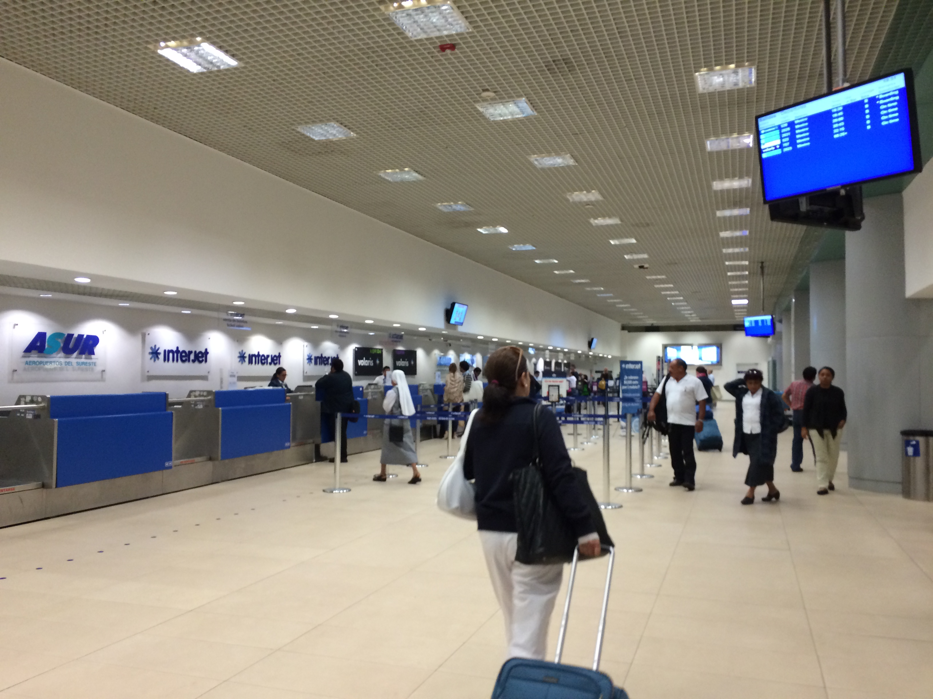 Zona de documentación del Aeropuerto de Mérida.